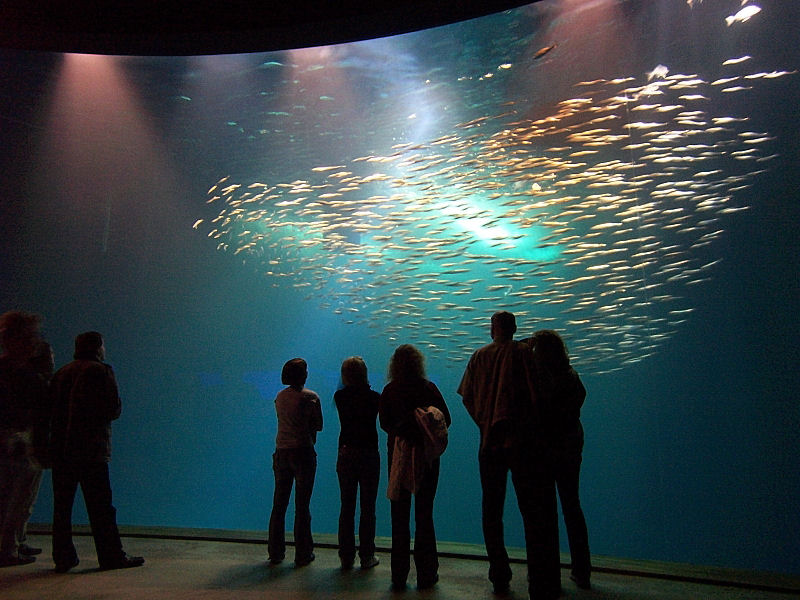 Großauquarium mit Heringsschwarm im Ozeaneum Stralsund